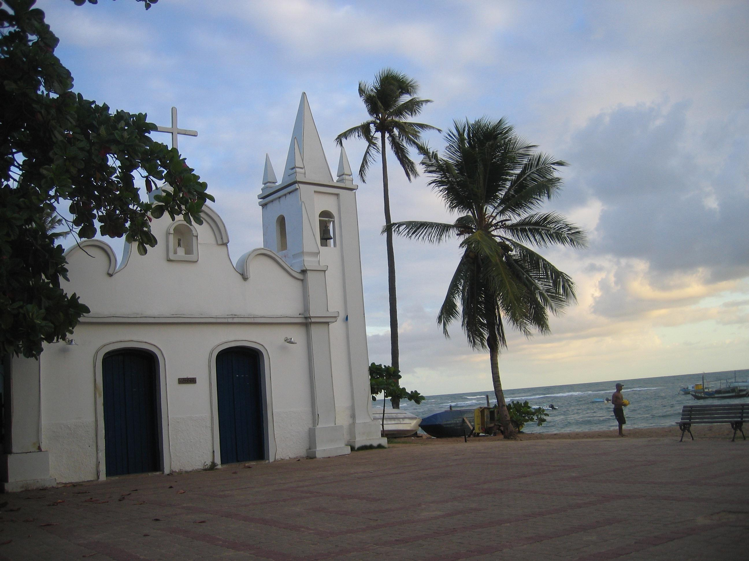 Praia do Forte, Bahia, Brazil